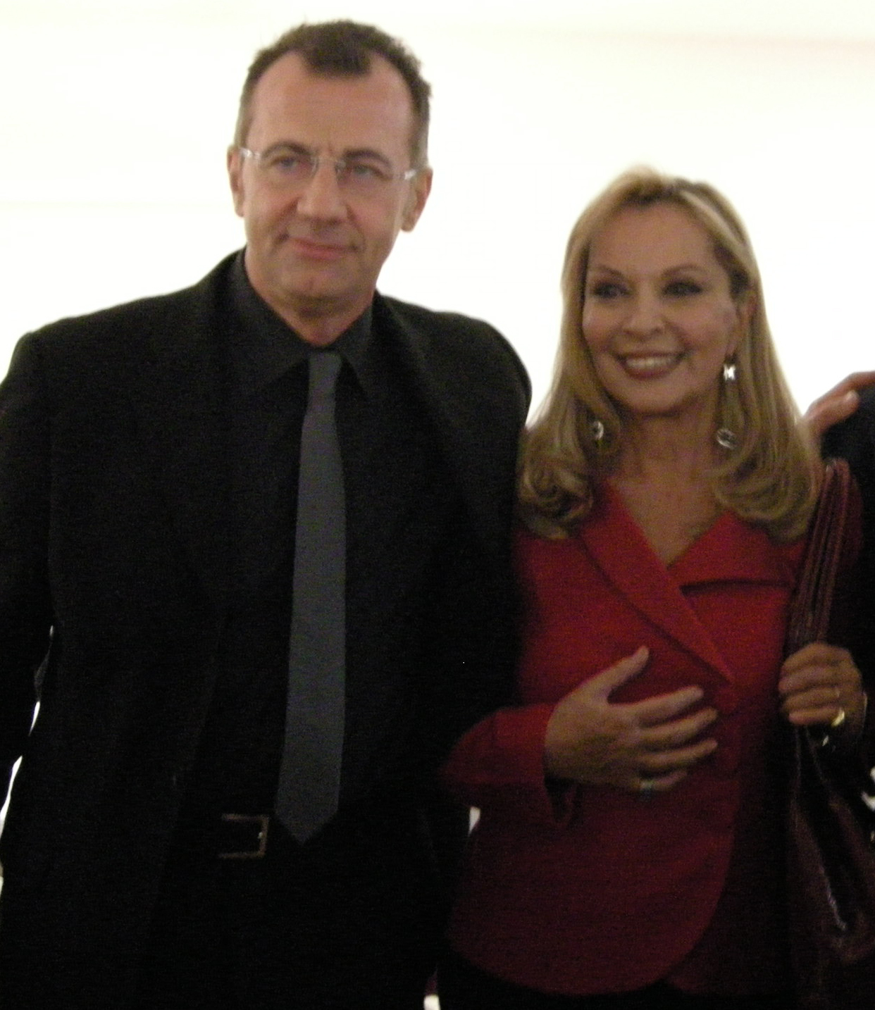 Michele Cucuzza e Silvana Giacobini, 2011